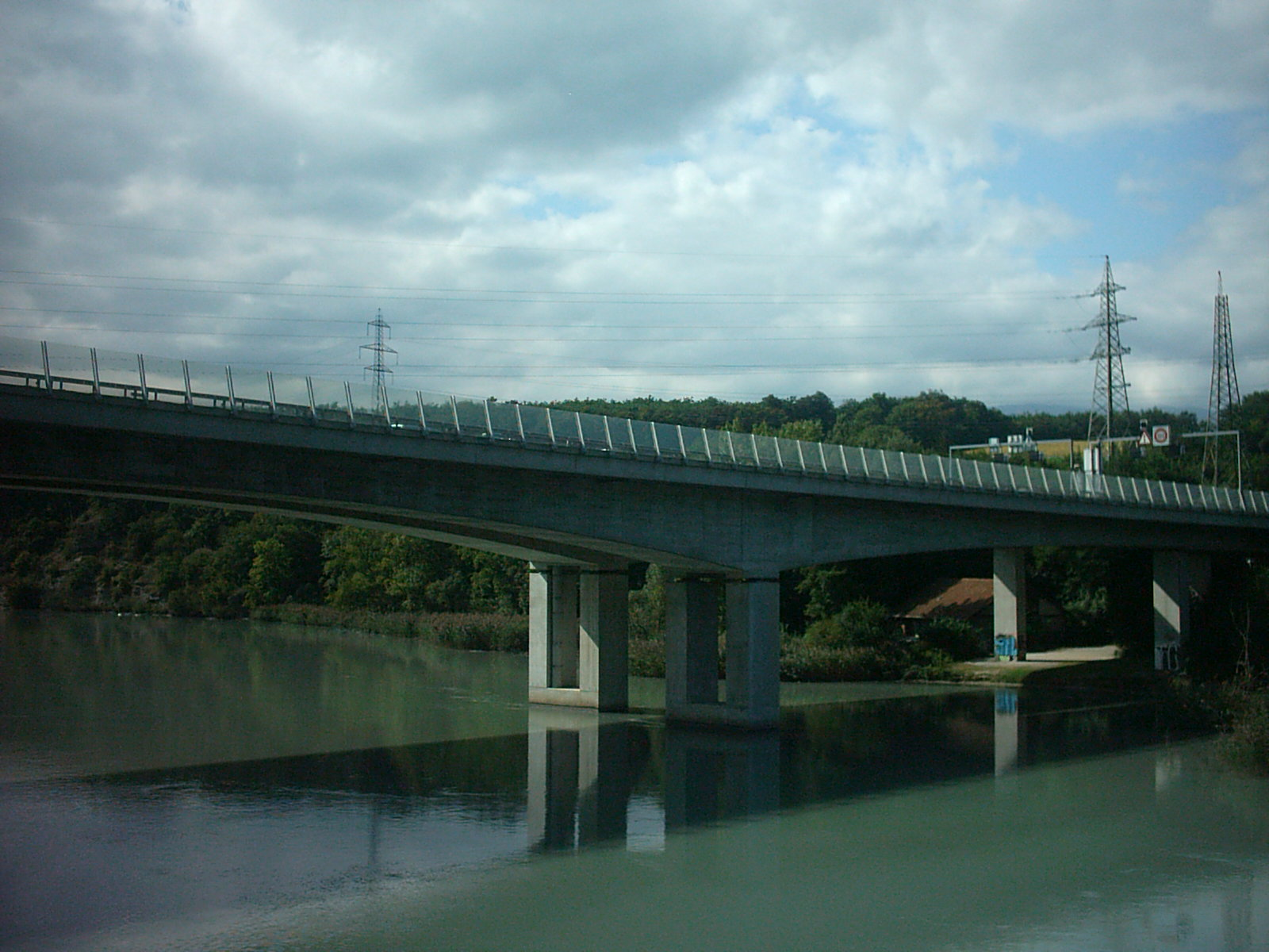 Pont d'Aigues-Vertes à Vernier (Suisse)